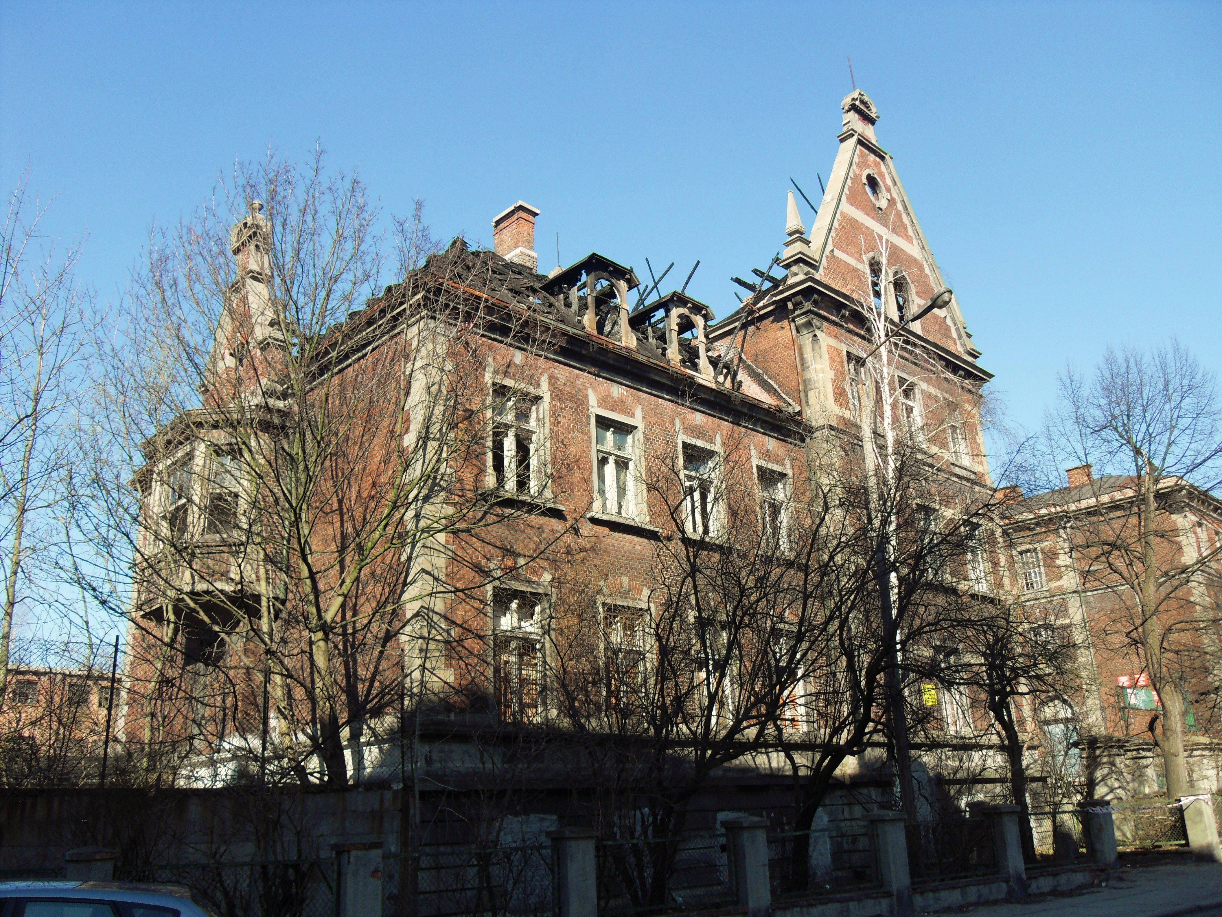 Gdańsk. Zespół rzeźni, ul. Angielska Grobla 19.